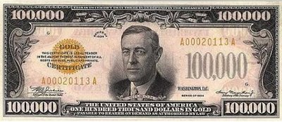 Foto del billete de cien mil dolares estadounidenses